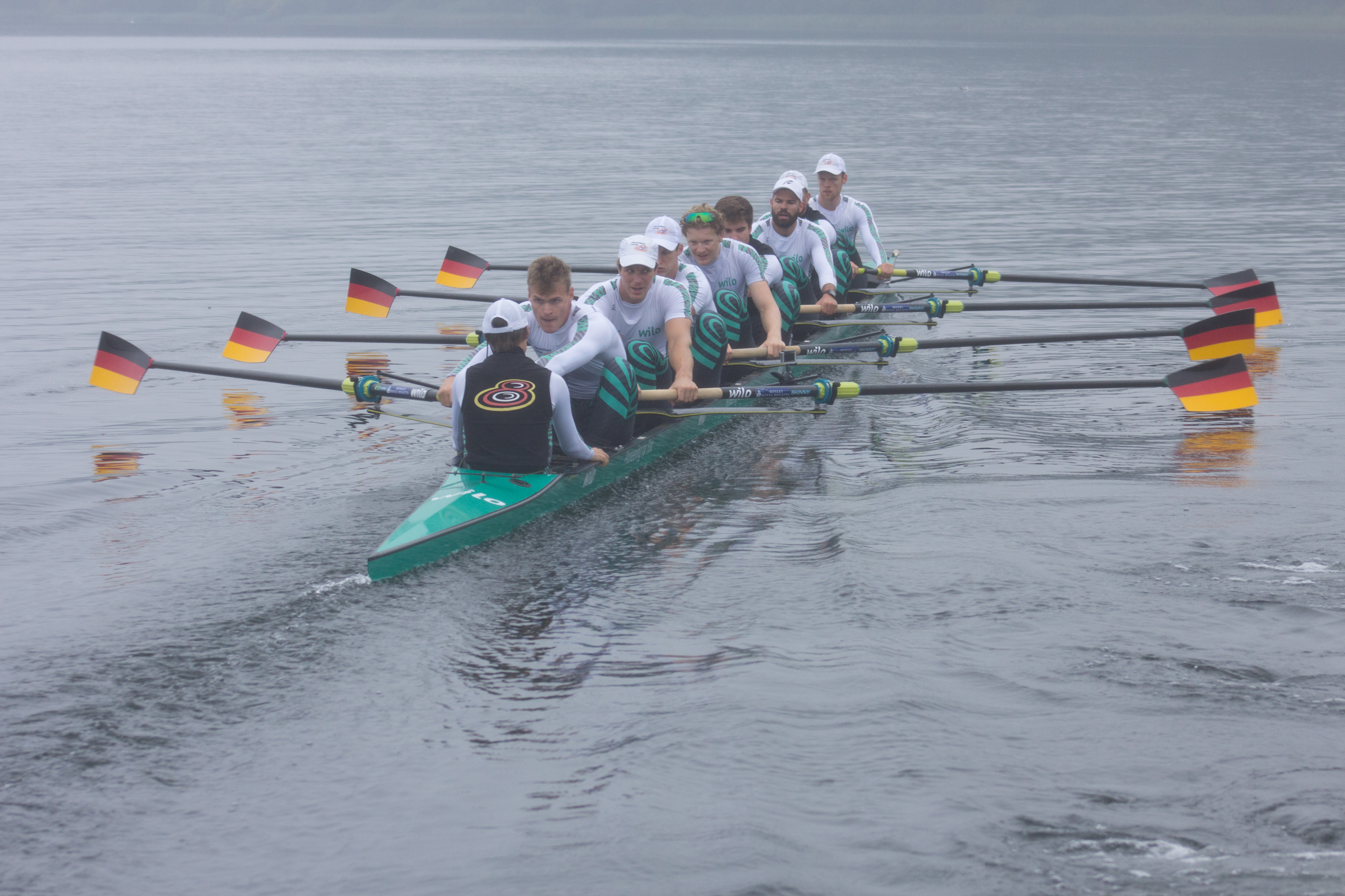 Medientag des Ruderverbandes in der Ruderakademie Ratzeburg am 6. September 2017: Deutschland-Achter im Training auf dem Ratzeburger See in der Besetzung: Johannes Weißenfeld, Felix Wimberger, Maximilian Planer, Torben Johannesen, Jakob Schneider, Malte Jakschik, Richard Schmidt, Hannes Ocik, Martin Sauer